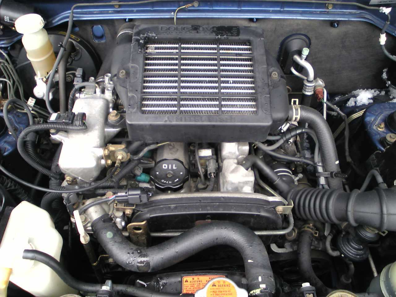 Mitsubishi 4A30 turbo (20valve)